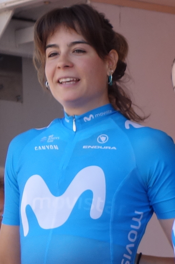 Sheyla Gutiérrez (Movistar) bij de start van de eerste etappe van Stramproy naar Weert in de Boels Ladies Tour 2019